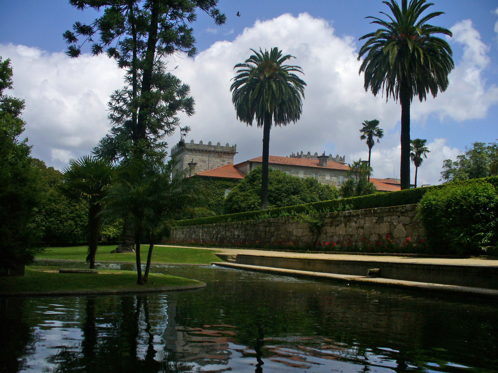 Baseno en la angla ghardeno. Palaco Quiñones de León, Vigo, Galegio